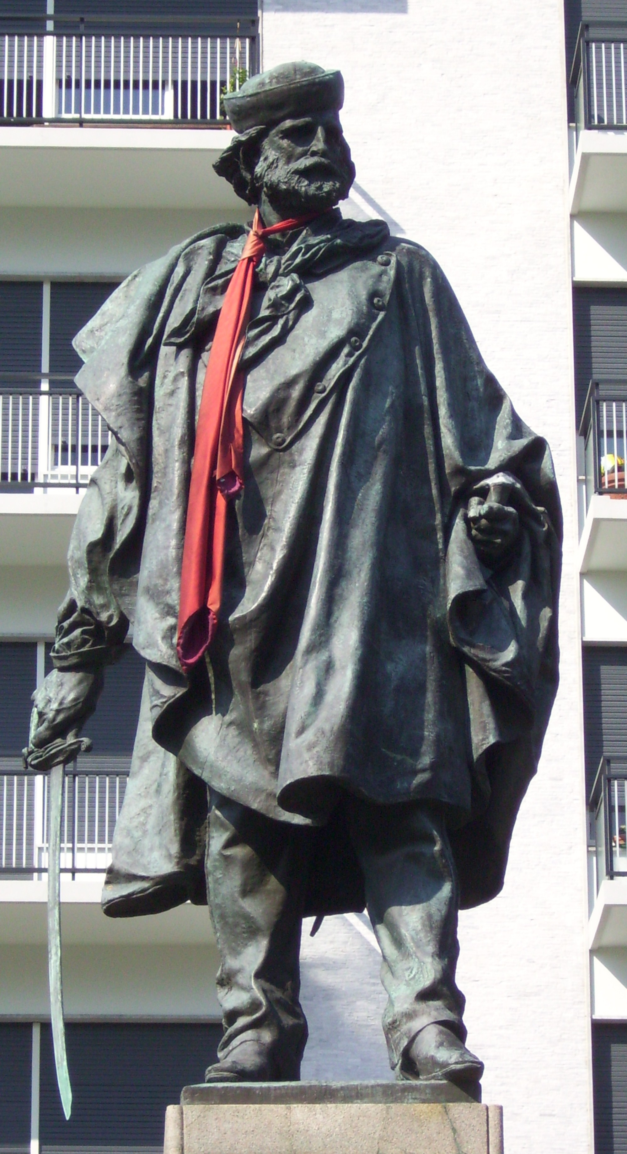 Monumento a Garibaldi in Piazza Vittoria realizzato da Vincenzo Vela. Originariamente era posto sul lato opposto della piazza